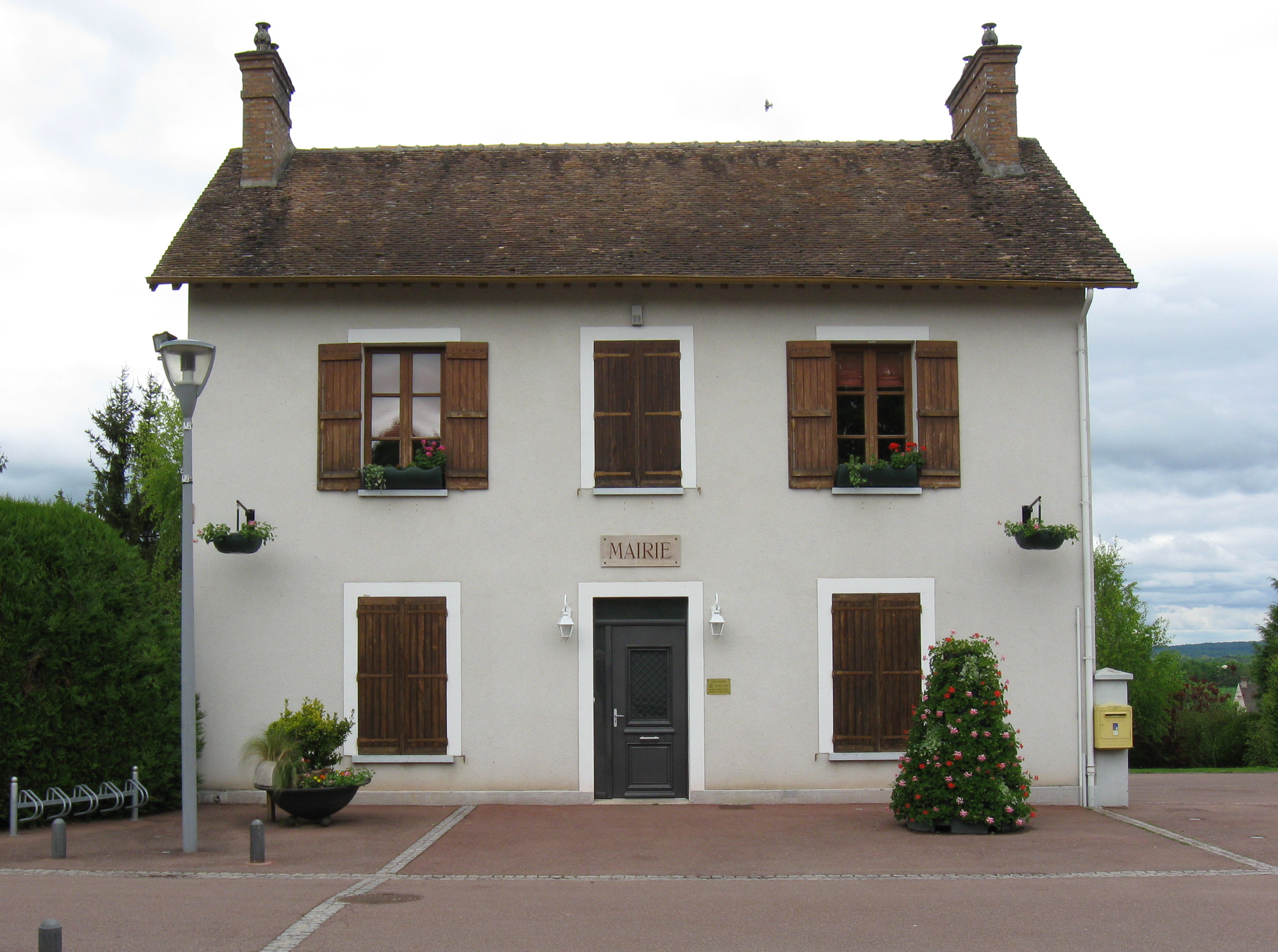 Mairie de Darvault (Seine-et-Marne, Île-de-France, France).